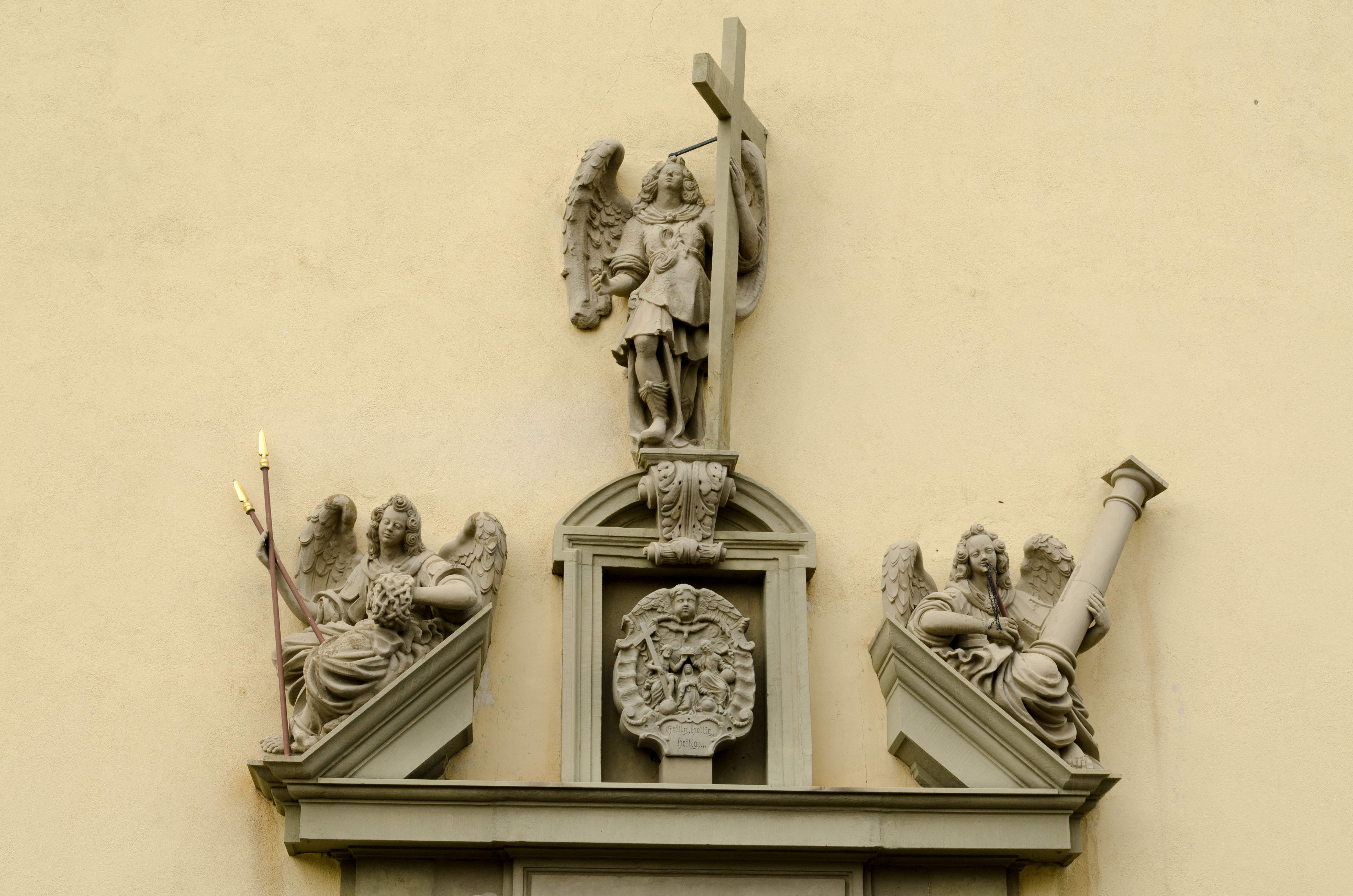 Buchbrunn, Katholische Filialkirche Mariä Himmelfahrt